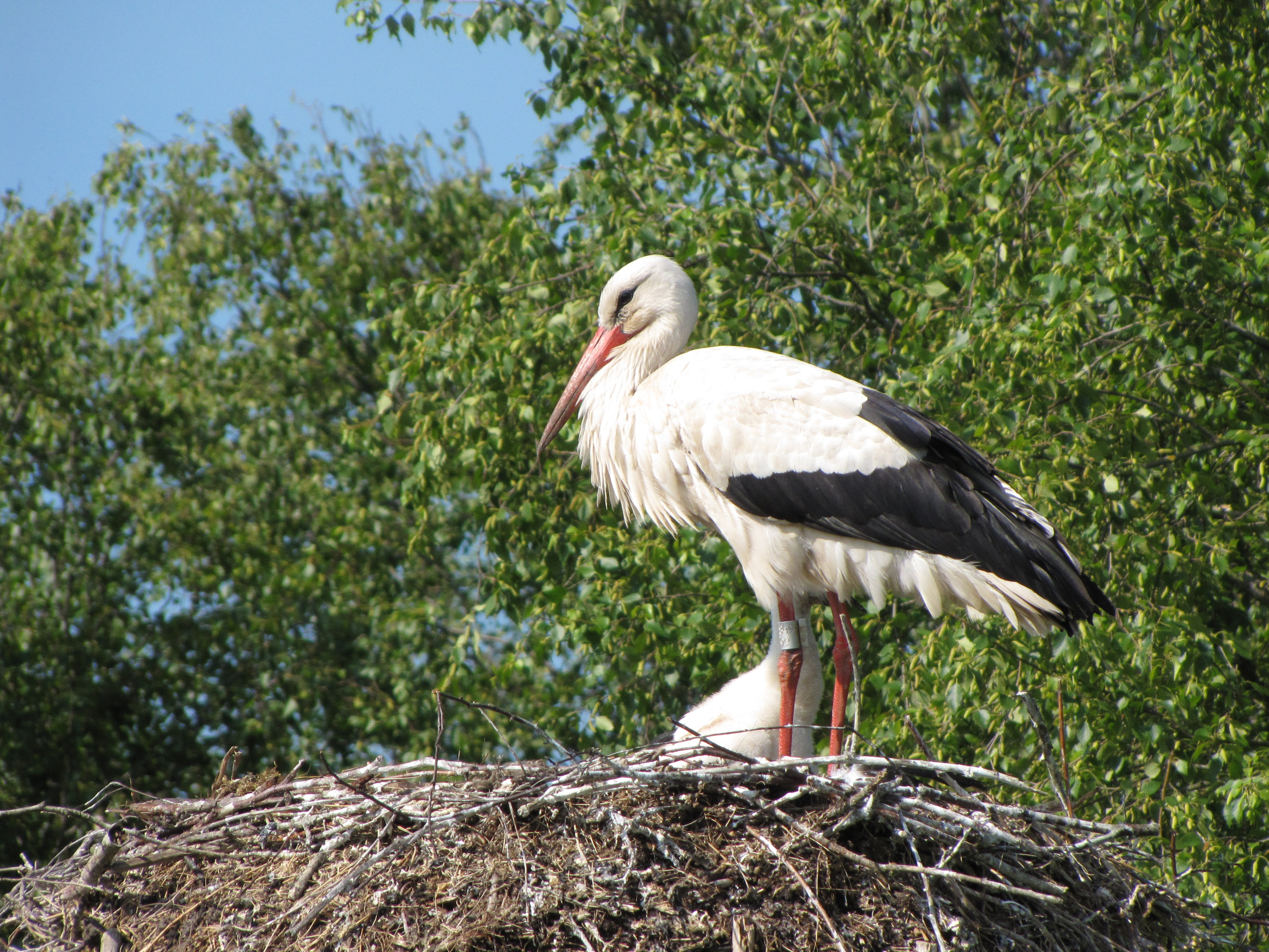 De aanwezigheid van ooievaarstation It Eibertshiem heeft geleid tot veel ooievaars in en bij Earnewâld. This is a photo or sound file made in De Alde Feanen National Park in the Netherlands, with the main subject of the file in the category: animals